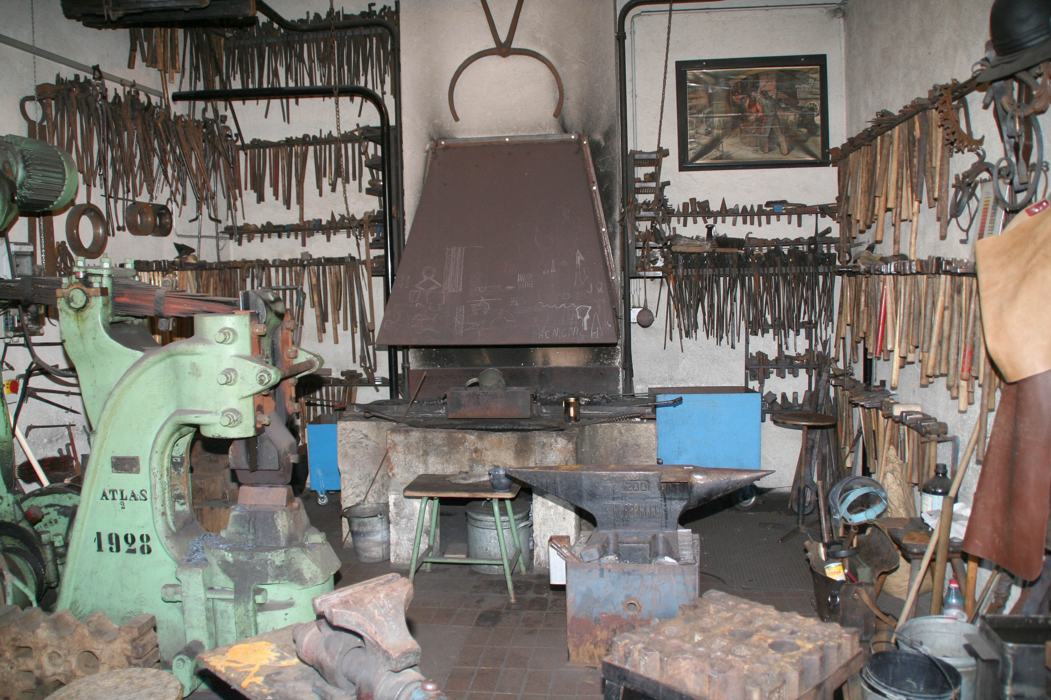 PEP Schmëdd. Kategorie:Gemeng Réiser